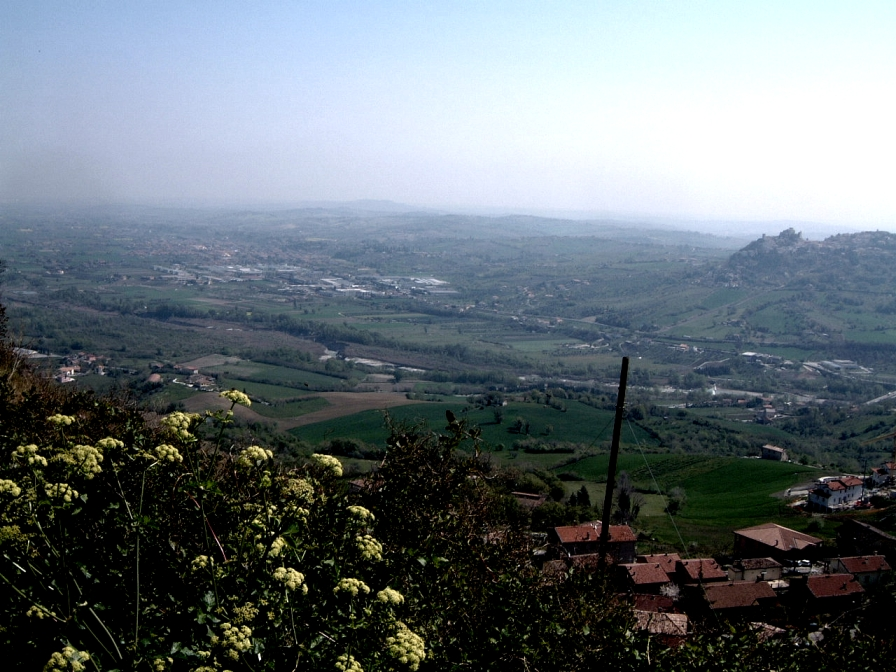 Vue panoramique de la commune de Verucchio et la vallée du Marecchia depuis la forteresse de Montebello (Rimini), Italie